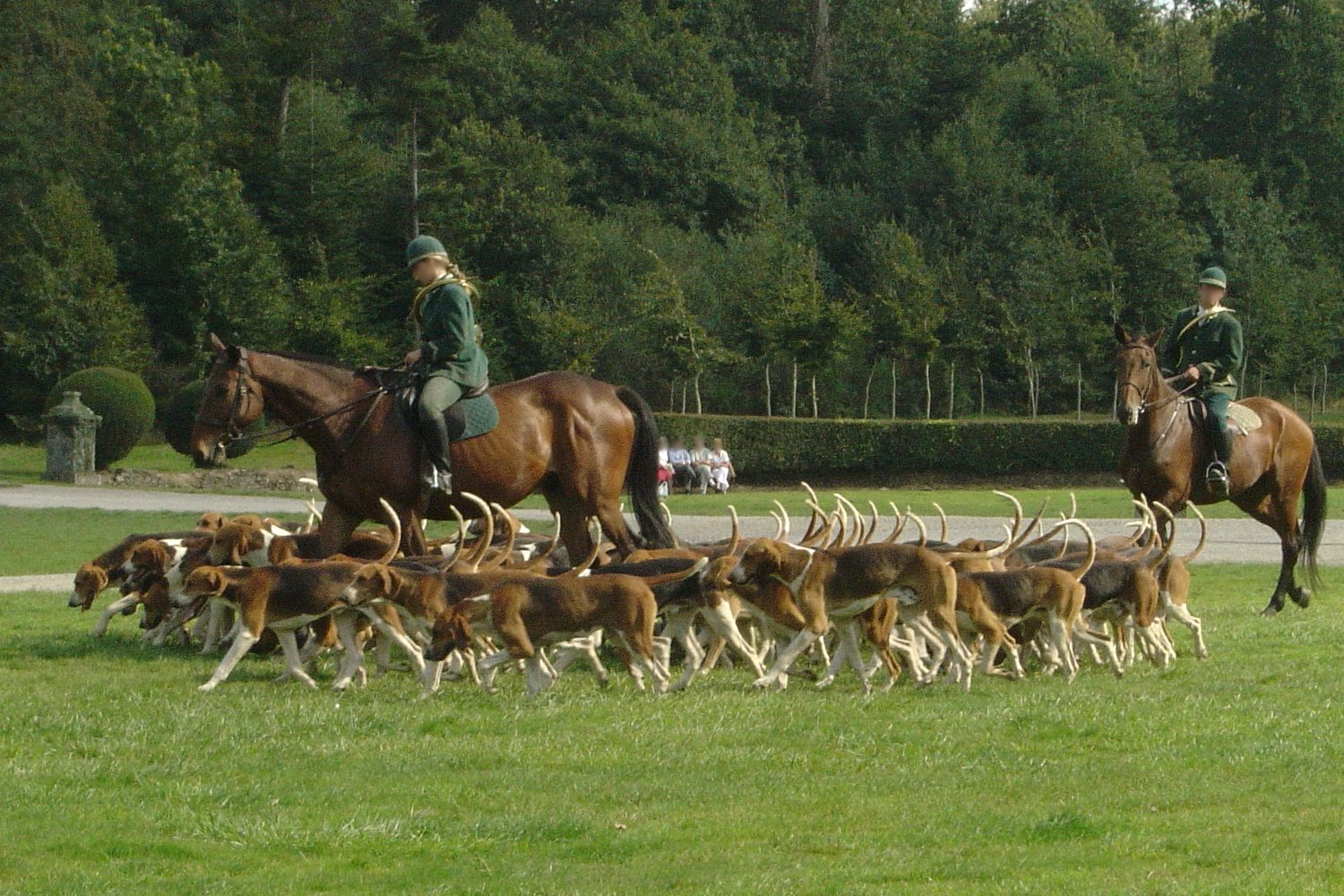 Démonstration de vénerie - photo personnelle prise en , publiée en GFDL pour wikipedia